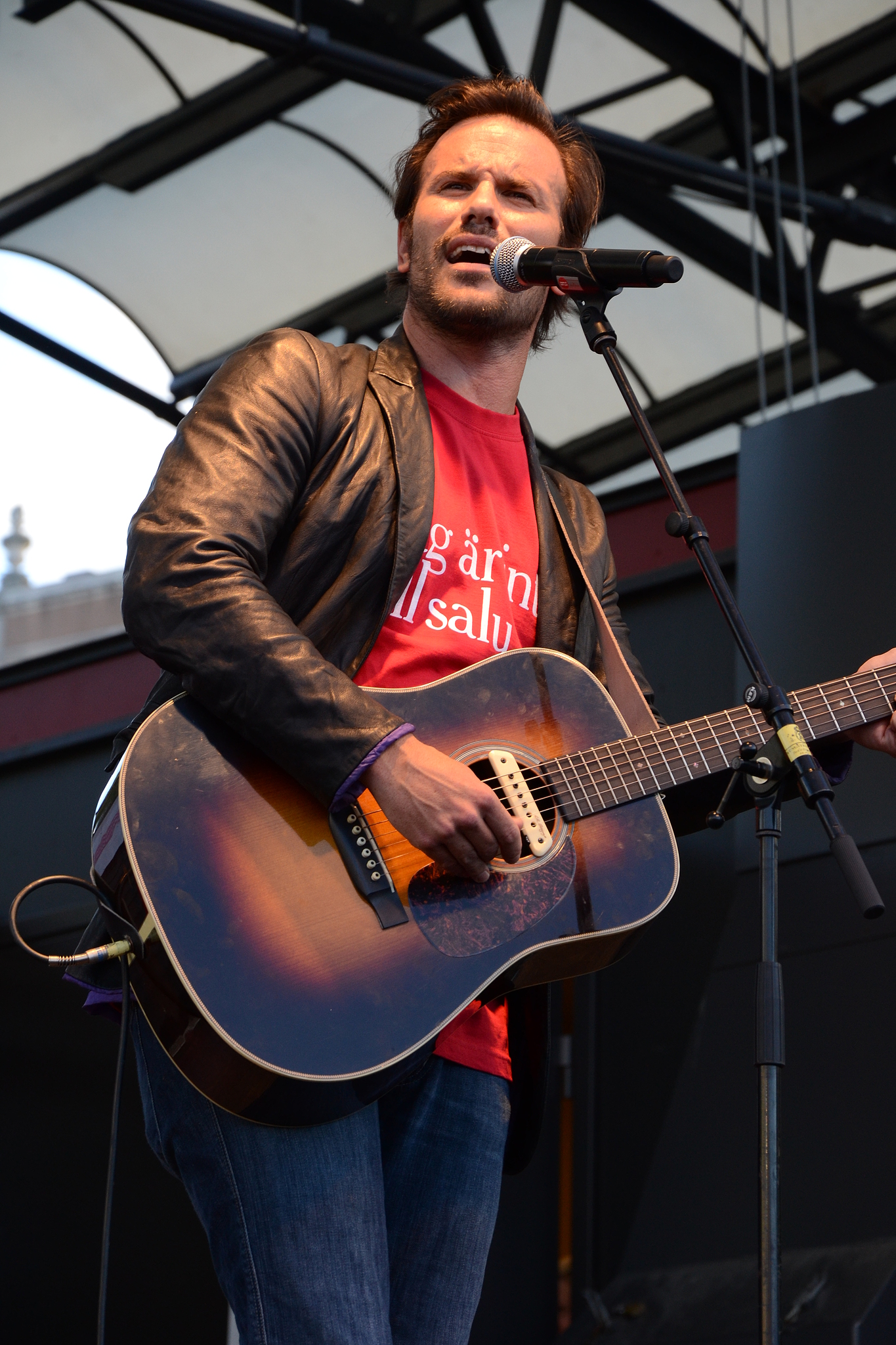 Från Barnrättsgalan 2011-08-23 i Kungsträdgården